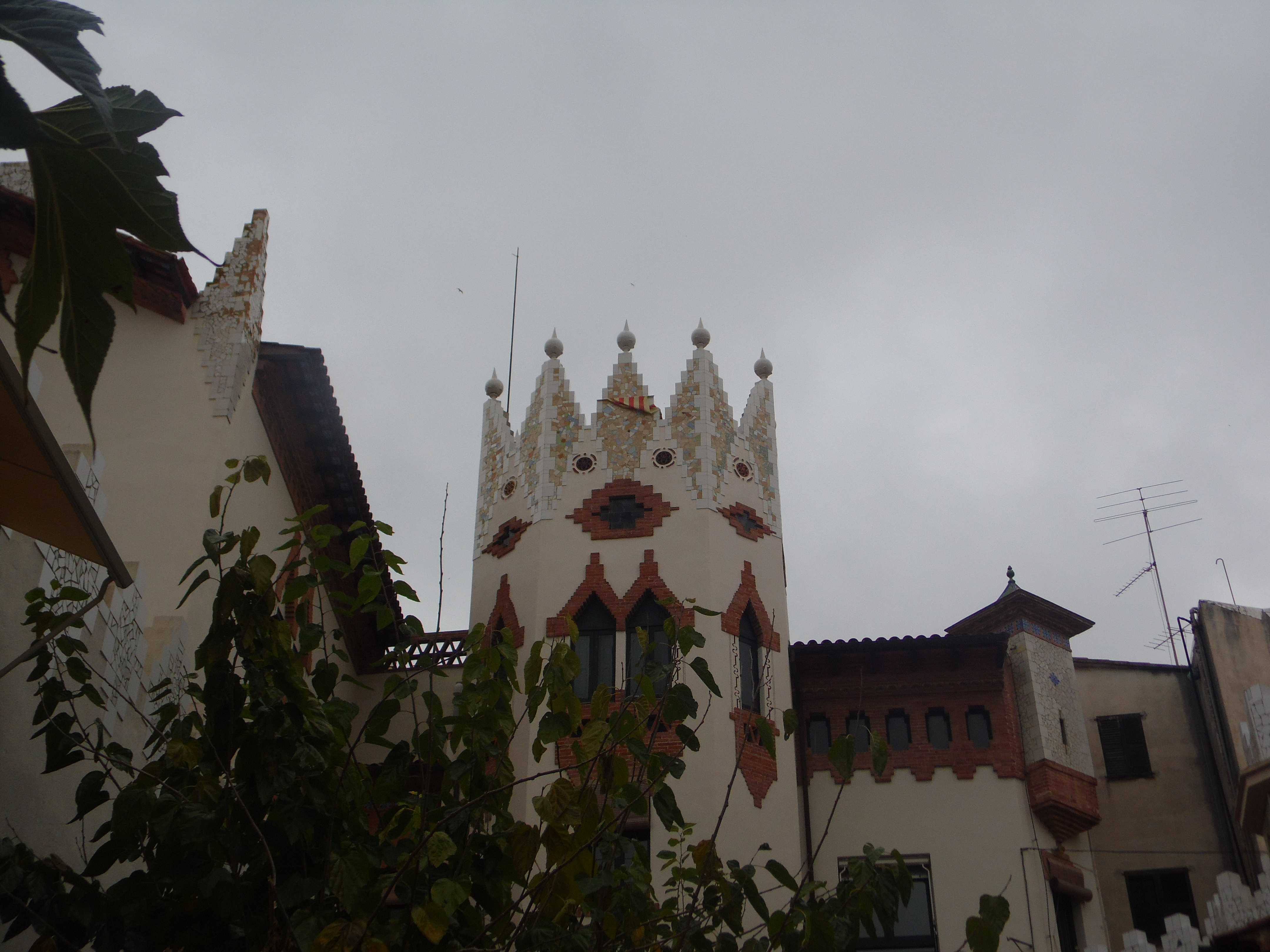 Rectoria (Lloret de Mar)